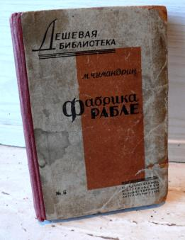 Чумандрин, Михаил Фёдорович. Фабрика Рабле, 1928